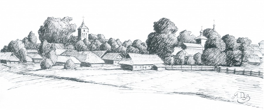 Беларуская (тарашкевіца): Мір (Mir). Панарама мястэчка